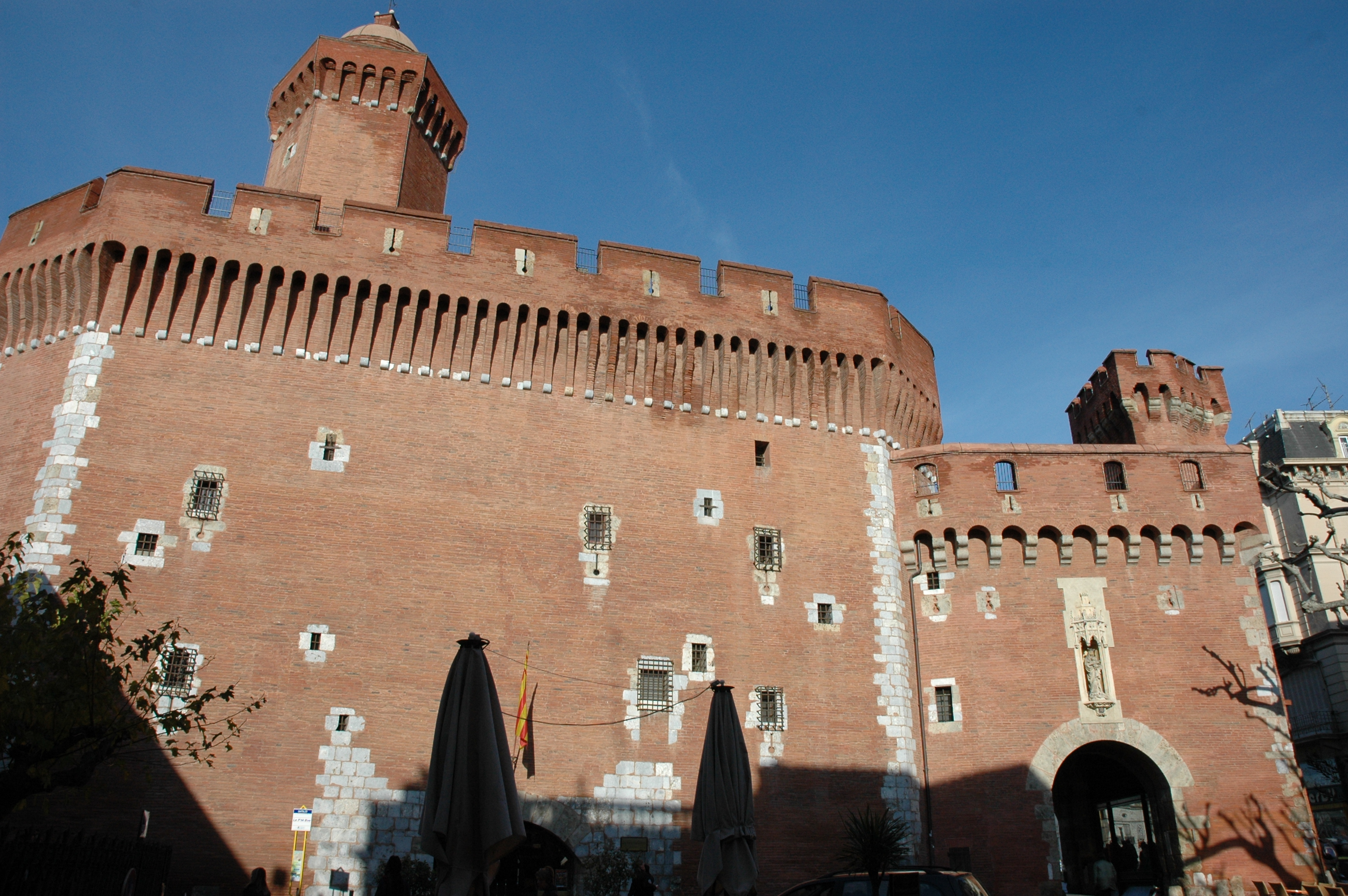 Perpinyà - Castellet